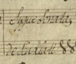 Attribution de la sonate K. Deest en la majeur, du manuscrit Ronda de Madrid, pages 53.